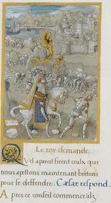 Cote cliché : 02-016045 N° d’inventaire : Ms764-folio23recto Fonds : Miniatures et enluminures Titre : Liber Tertius Caesaris. Description : Troisième livre des Commentaires de la Guerre Gallique de César par François Demoulins. César approche de Vannes avec ses gens de pied Auteur : Godefroy le Batave (connu de 1516 à 1524) Ecole : Ecole française Période : 16e siècle Date : 1520 Technique/Matière : enluminure, parchemin Localisation : Chantilly, musée Condé